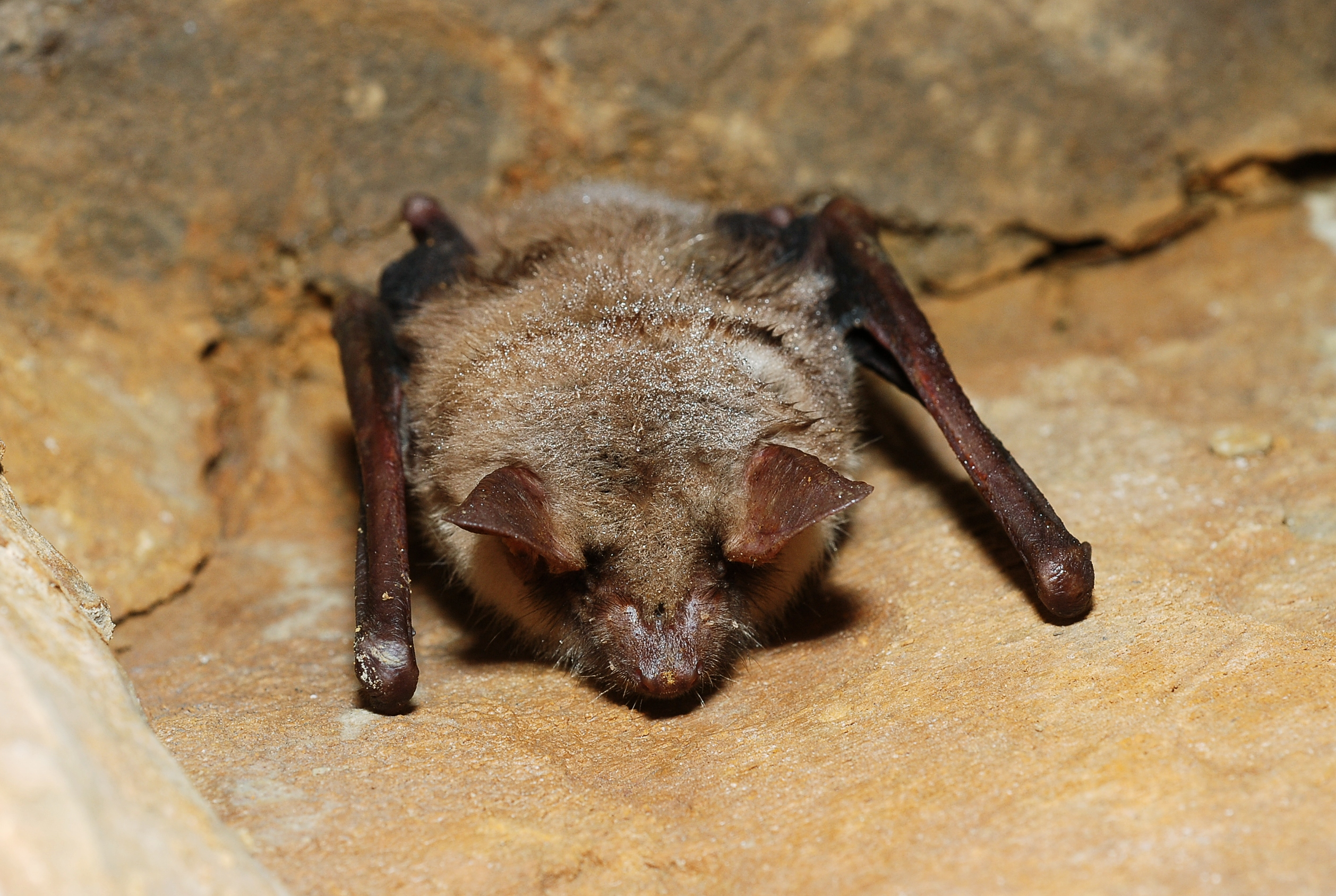 Myotis myotis